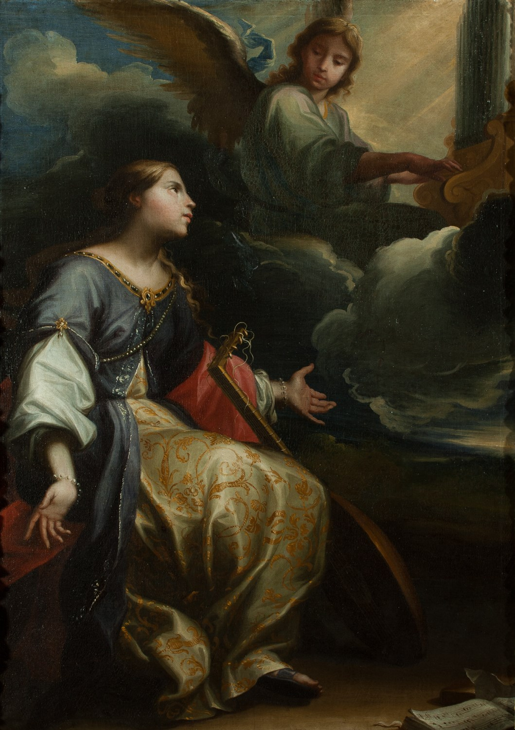 La obra representa a la mártir cristiana Santa Cecilia († 230) y procede del Convento de San Cayetano de Zaragoza.